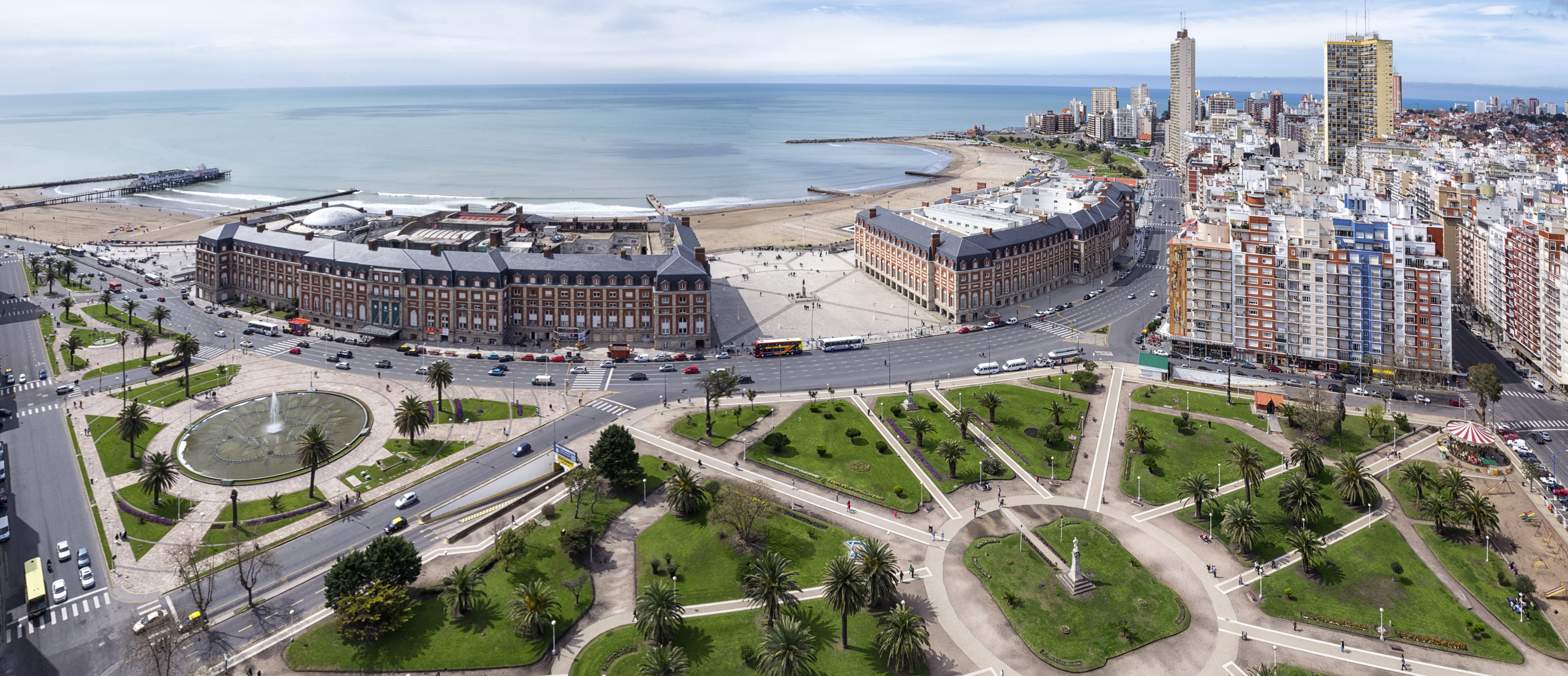 Hotel Provincial y Casino, Plaza seca y la Plaza Colón. Vista panorámica desde el Palacio Edén